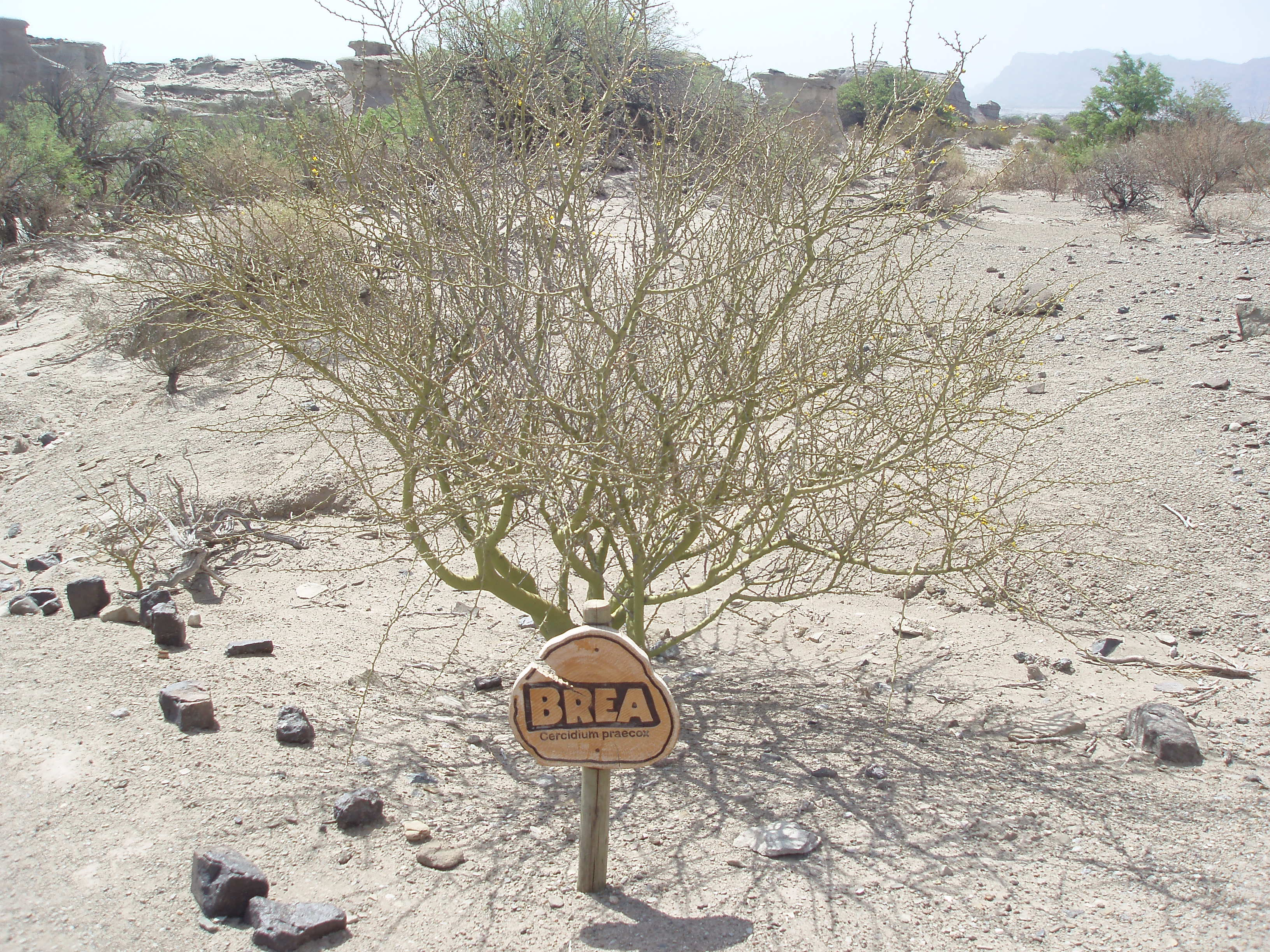 Parkinsonia praecox (Cercidium praecox), Parque Provincial Ischigualasto, Argentina